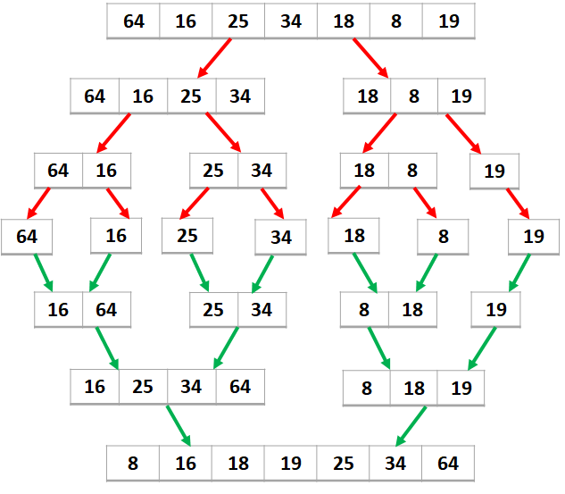 مثال از مرتب سازی ادغامی